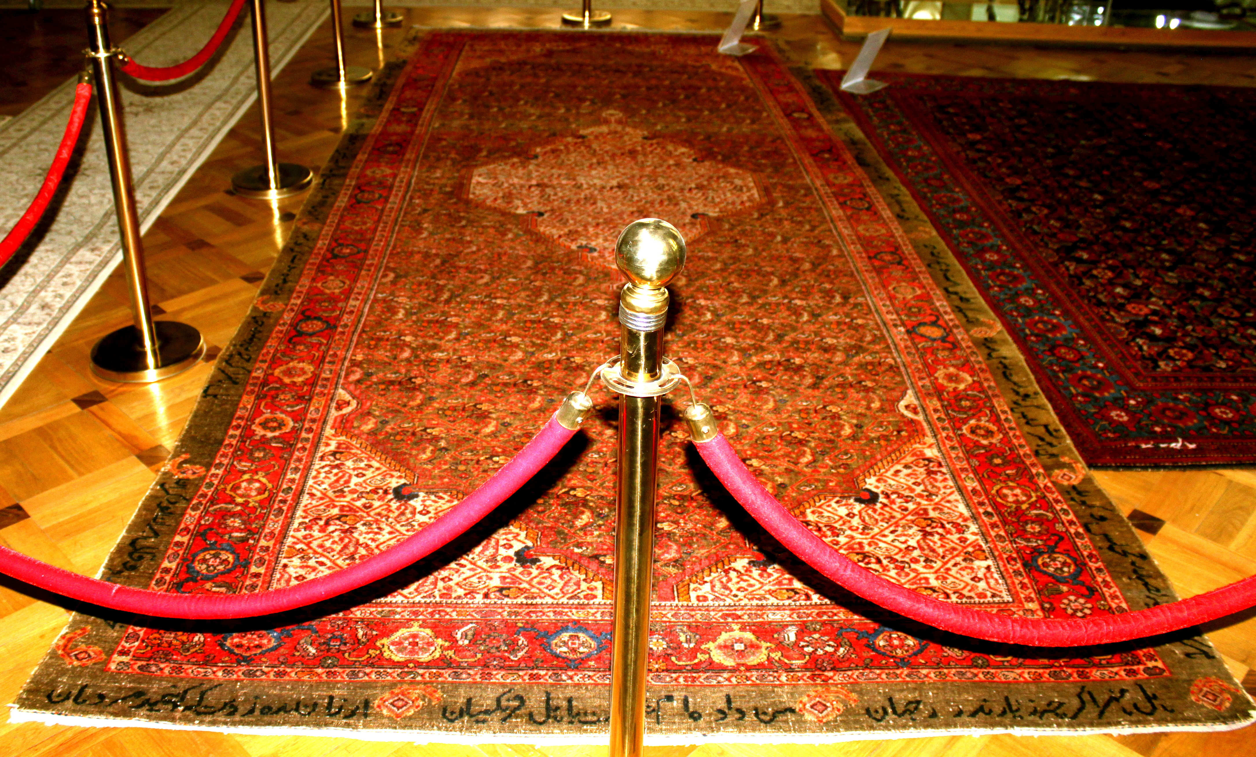 İrəvan xanı Əli xana məxsus "Məlayır" adlı Təbriz xalçası